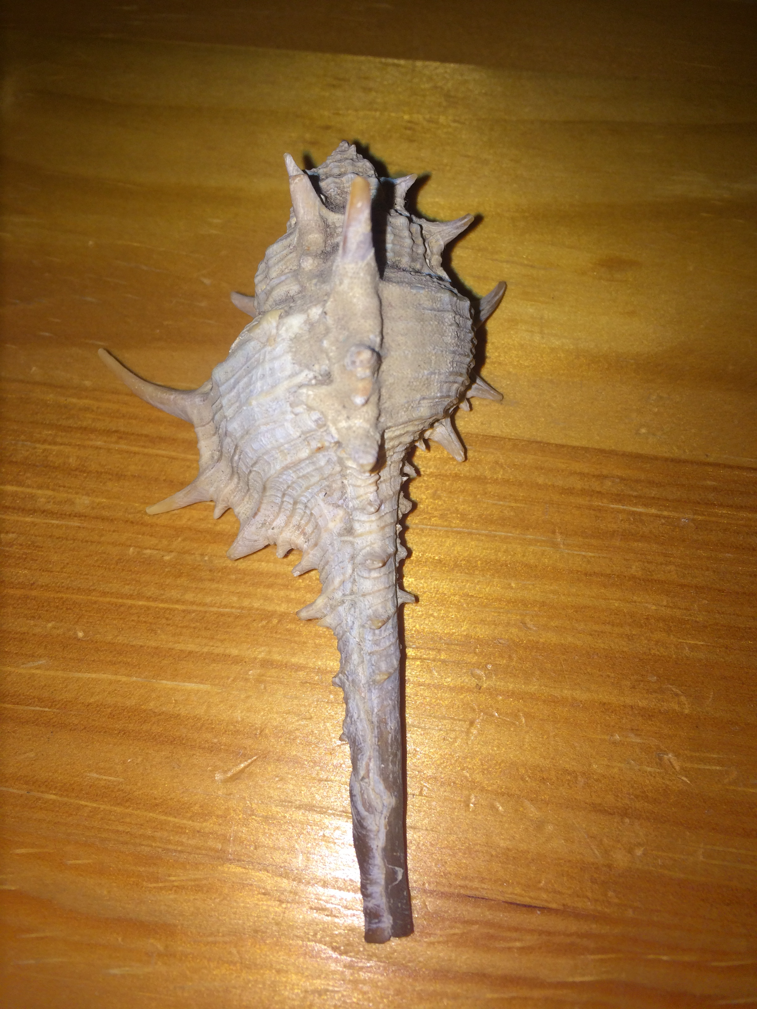 Oc bien gai nhon